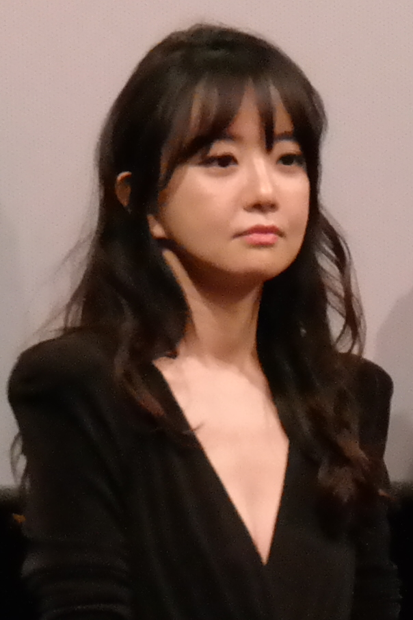 CGV 일산에서 열린 영화 《윤희》 언론 및 VIP 초청시사회에서 무대인사하는 최지연.